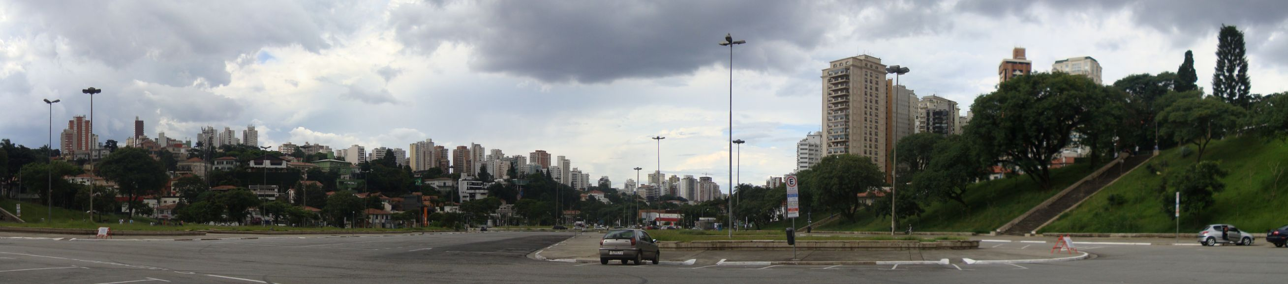 Panorama do bairro nobre de Pacaembu a partir da praça Charles Miller, zona central da cidade São Paulo, Brasil.